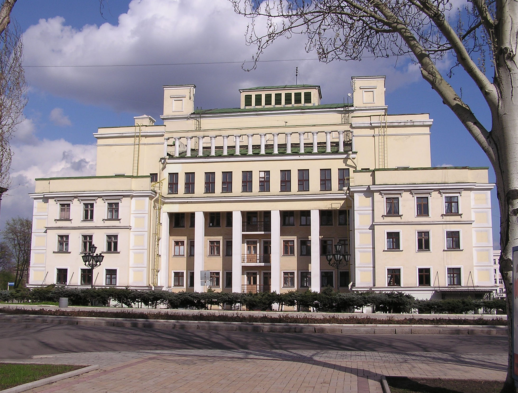 Донецкий академический государственный театр оперы и балета им. А.Б.Соловьяненко